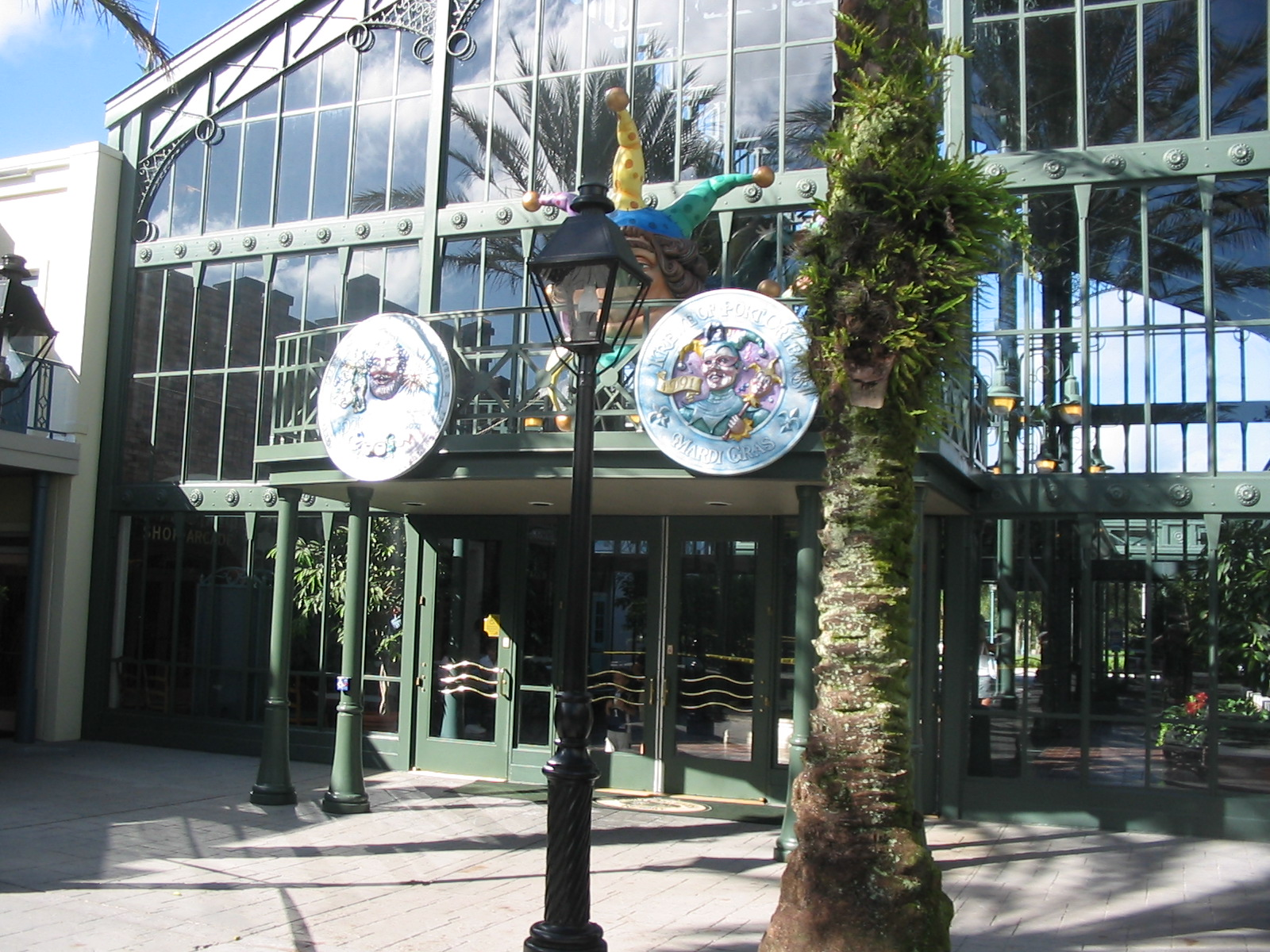 Hotel Port Orleans, Disneyworld